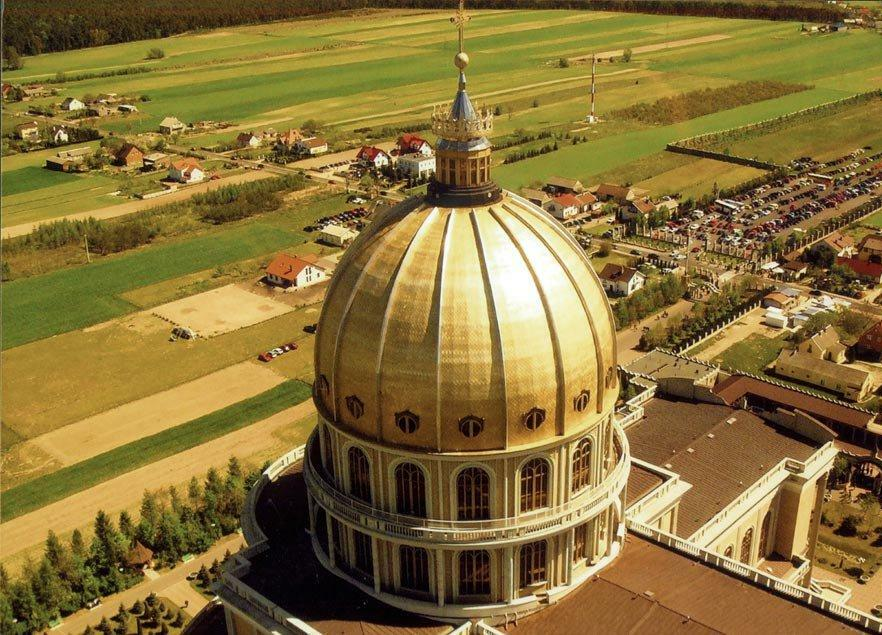 Kopuła Bazyliki, widok z wieży.